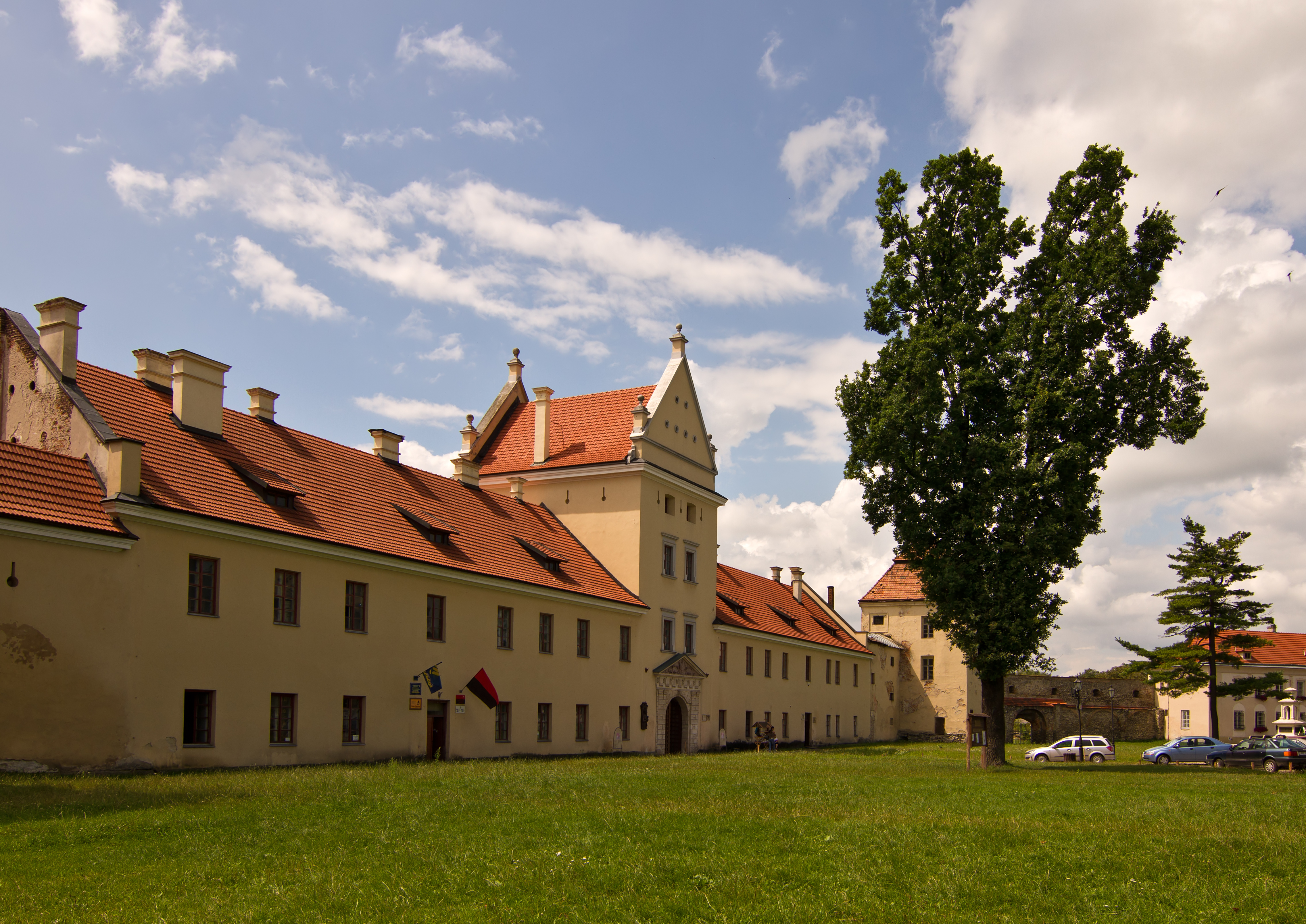 Замок Жолкевських(мур.), Жовква, пл.Вічева, 2